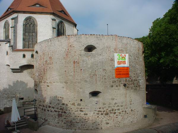 Halle Moritzburg, eigenes Foto von 2004, public domain Mewes 20:45, 17. Okt 2005 (CEST), Nordostturm mit Kapelle.